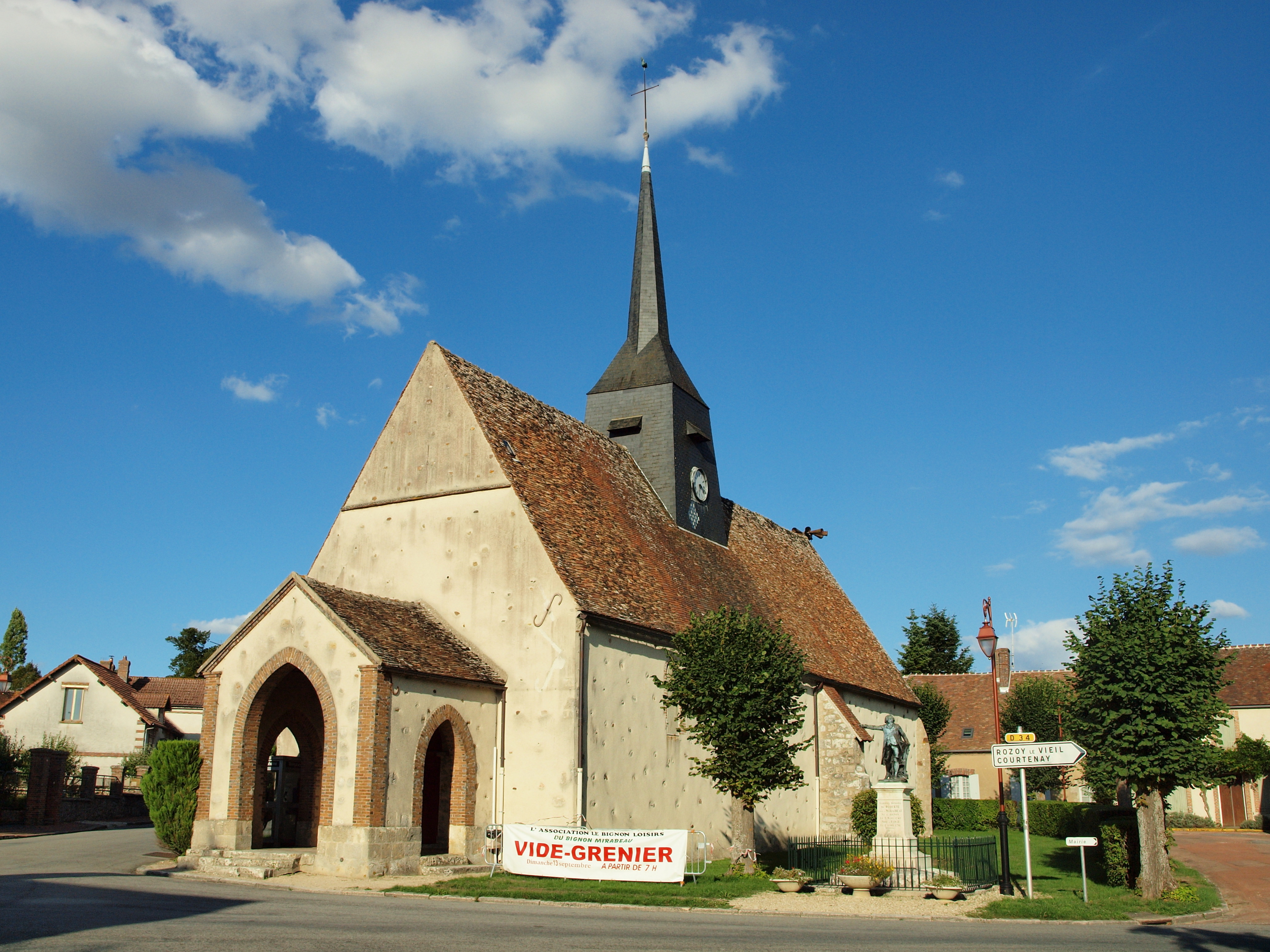 Église Saint-Jean-Baptiste du Bignon-Mirabeau (Loiret, France)